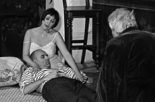 Représentation du Pauvre Matelot au théâtre Théâtre Manoel à Malte. Production par l'ARCAL. Mise en scène Christian Gangneron Piano & direction musicale Stéphane Petitjean De gauche à droite, Jean Delescluse (le matelot), Claudine Le Coz (sa femme), Jean-Baptiste Dumora (son ami)